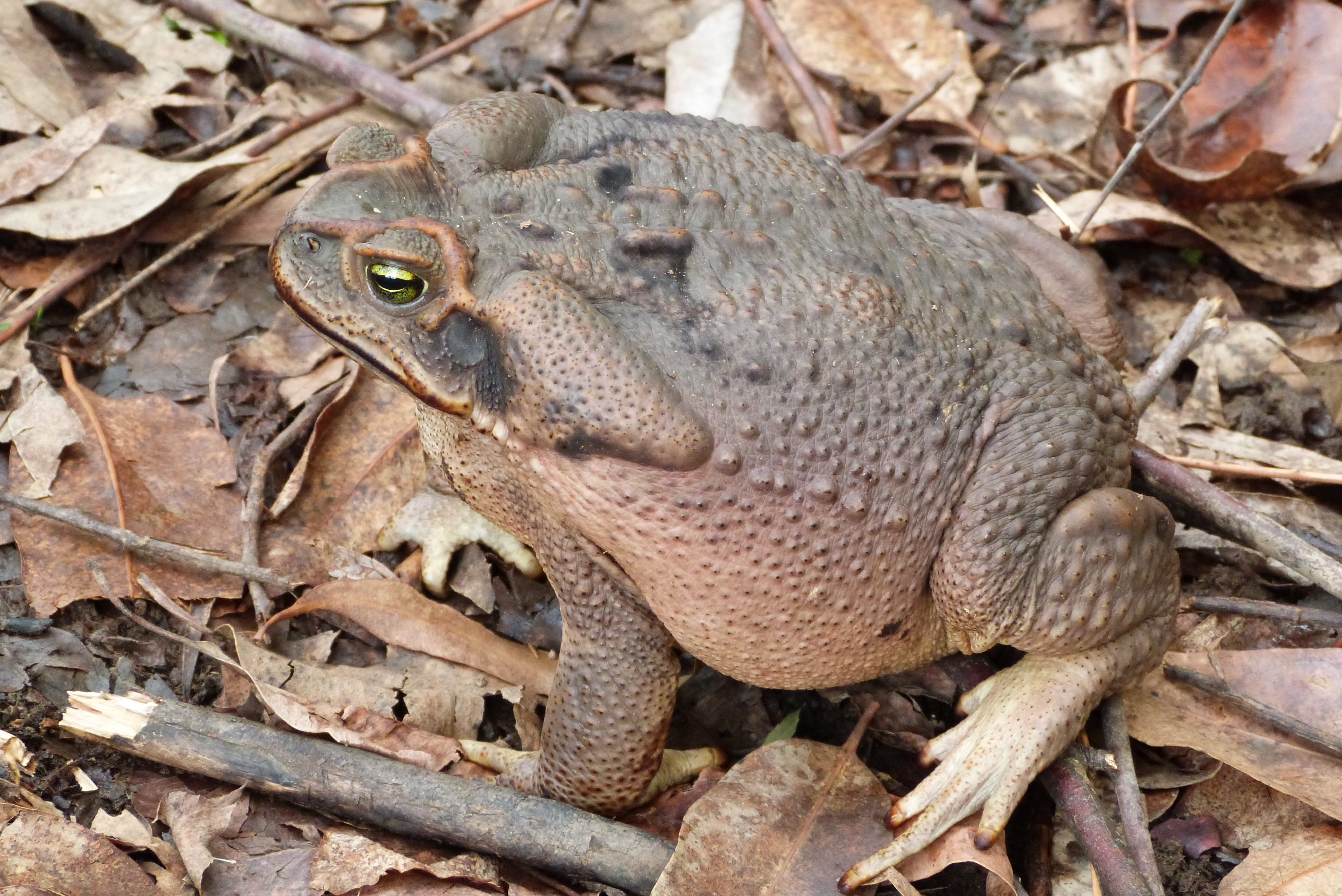 Foto tirada em Entre Rios - MG